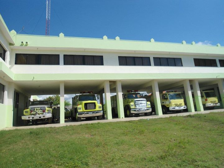 Villa Cesarina en San Pedro de Macoris